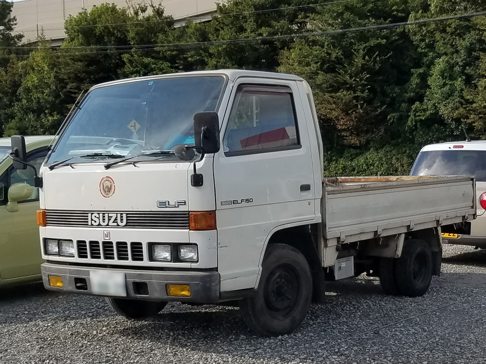 エルフ150 NHR54（前期型）